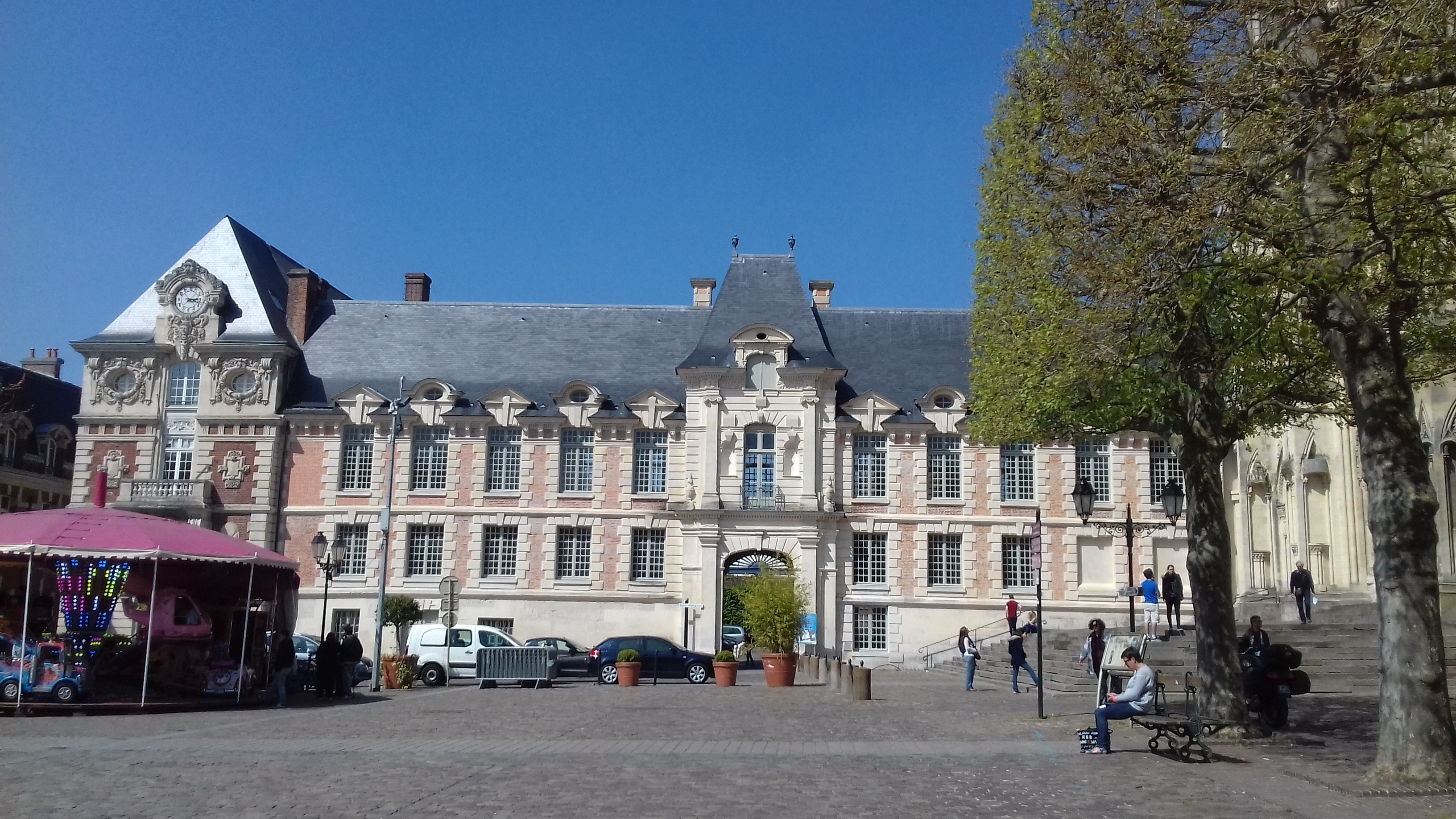 Lisieux, palais épiscopal, 1680